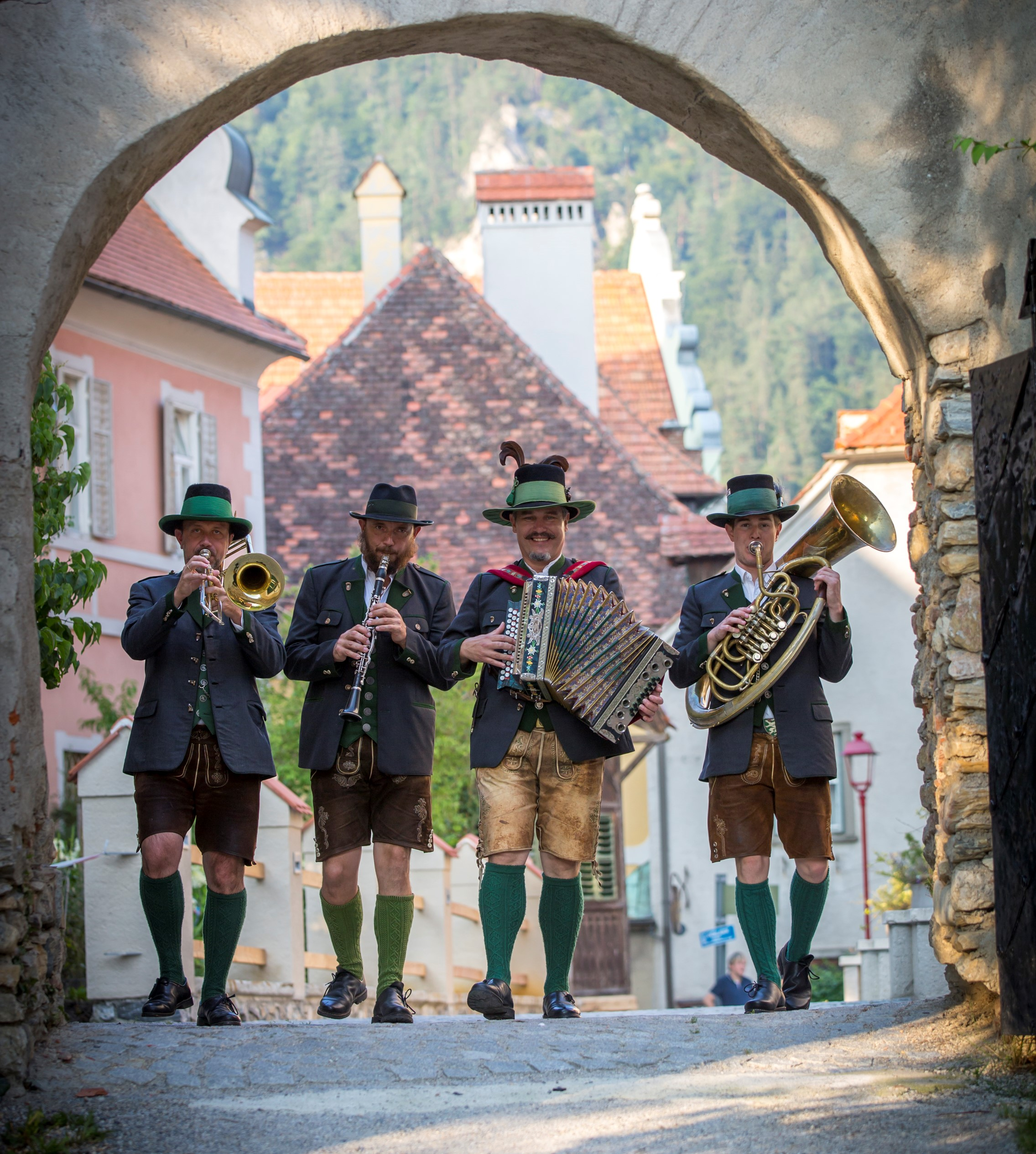 Aktuelle Besetzung